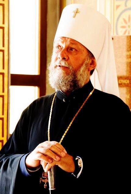 Митрополит Владимир (в миру Николай Васильевич Кантарян; род. 1952) — епископ Русской православной церкви,митрополит Кишинёвский и всея Молдавии